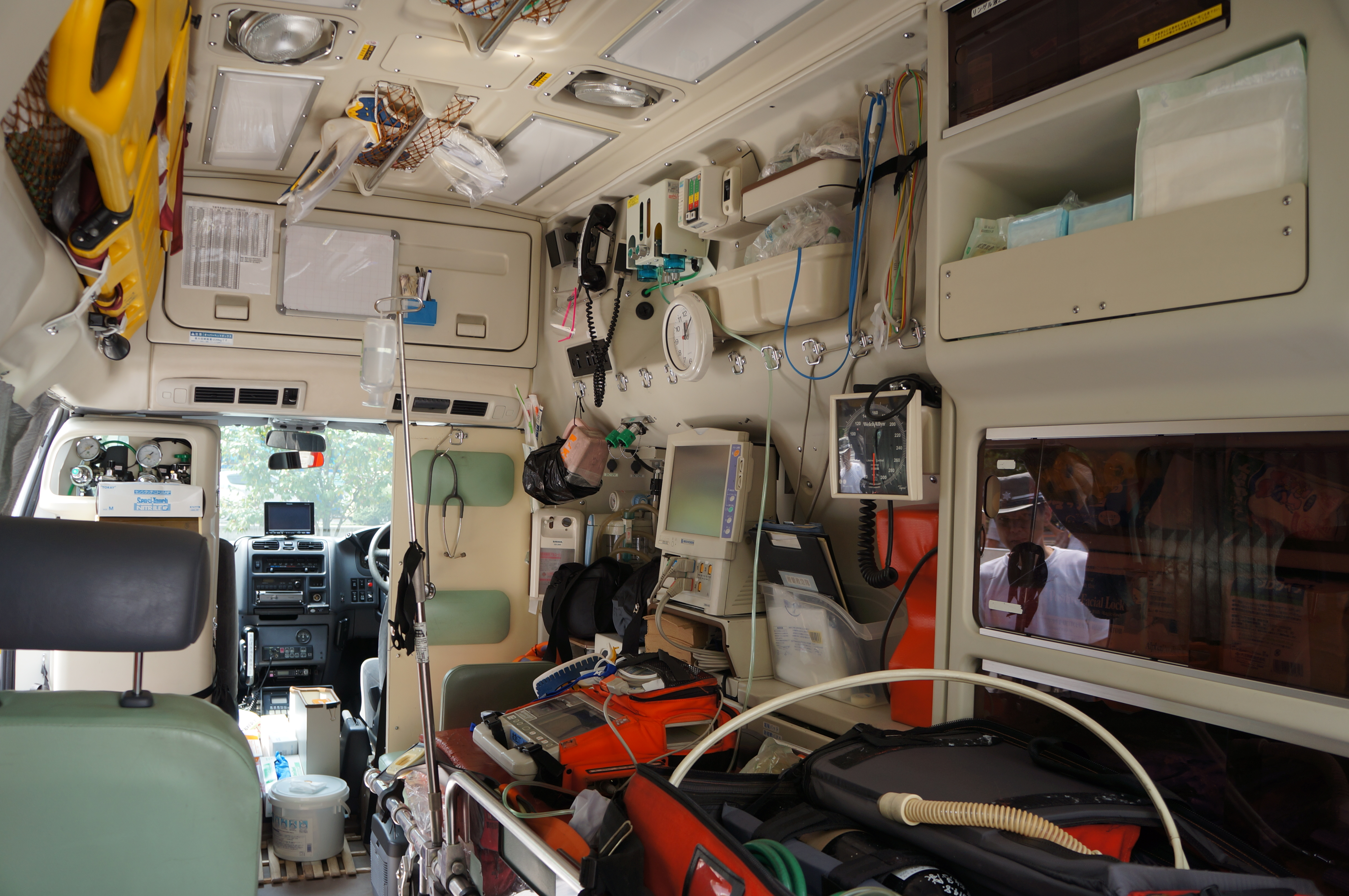 仙台市消防局 救急車車内